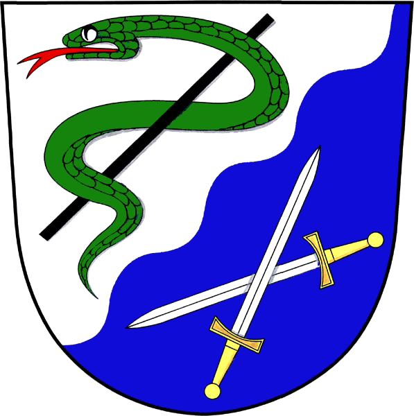 Znak obce Roztoky u Jilemnice